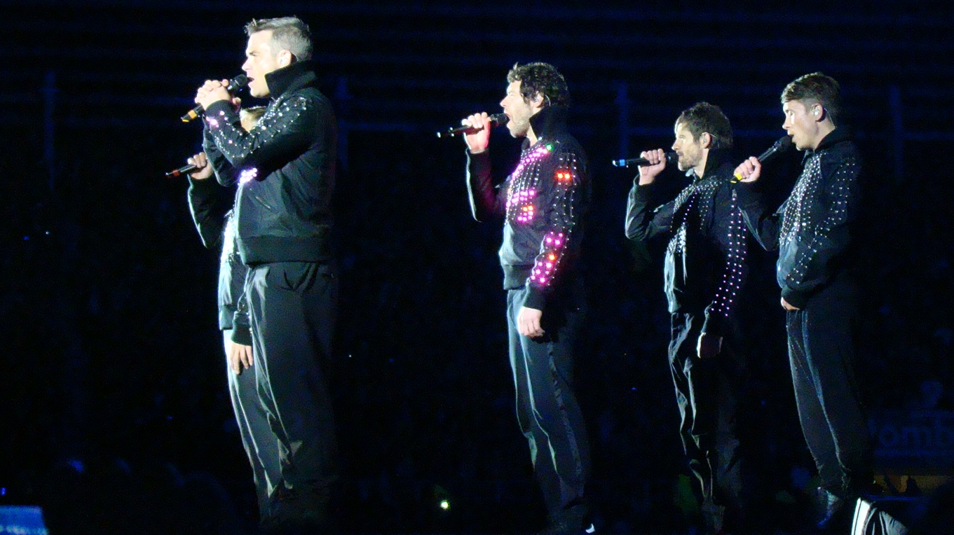 Take That durante la gira Progress Live, en 2011.